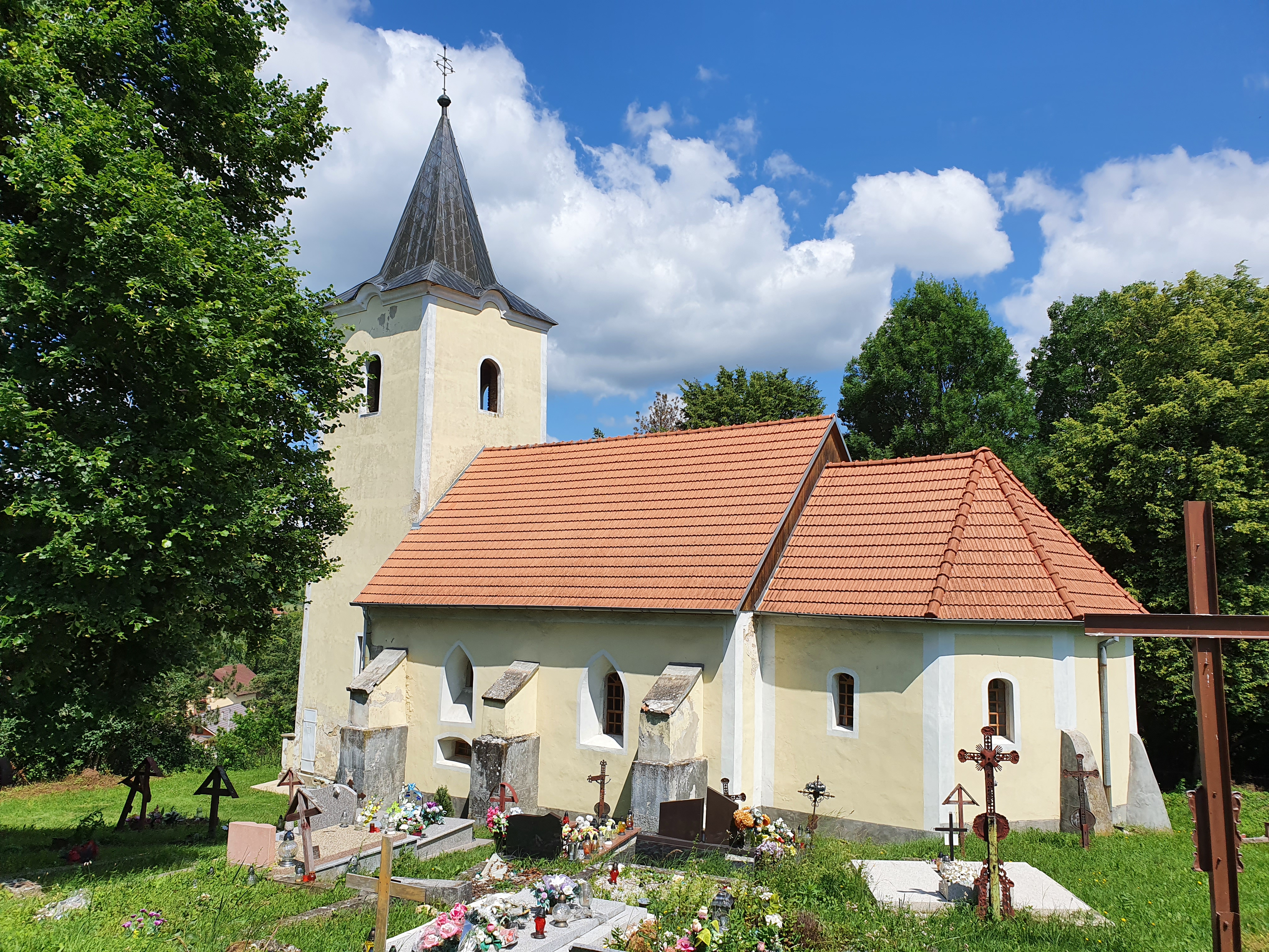 Rímskokatolícky kostol sv. Michala v Krajnom